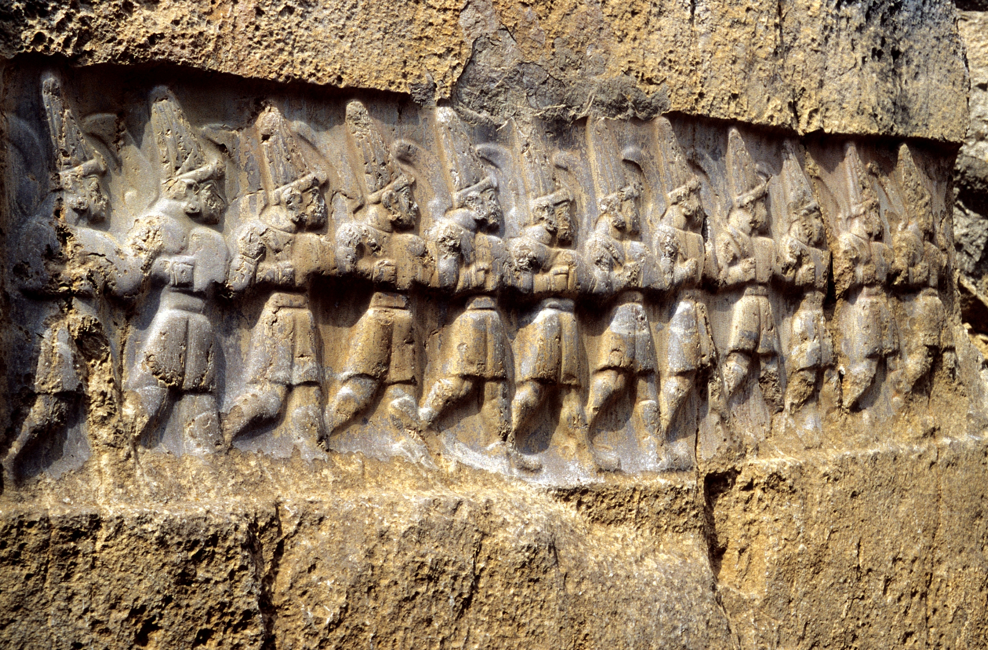 Yazilikaya, hethitisches Heiligtum bei Hattusa, Türkei, Kammer B Prozession der 12 Unterweltsgötter